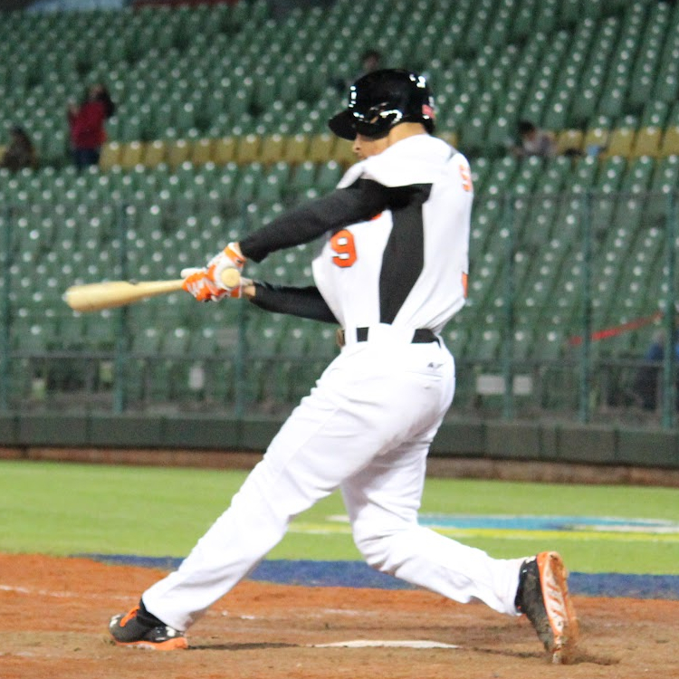 Andrelton Simmons